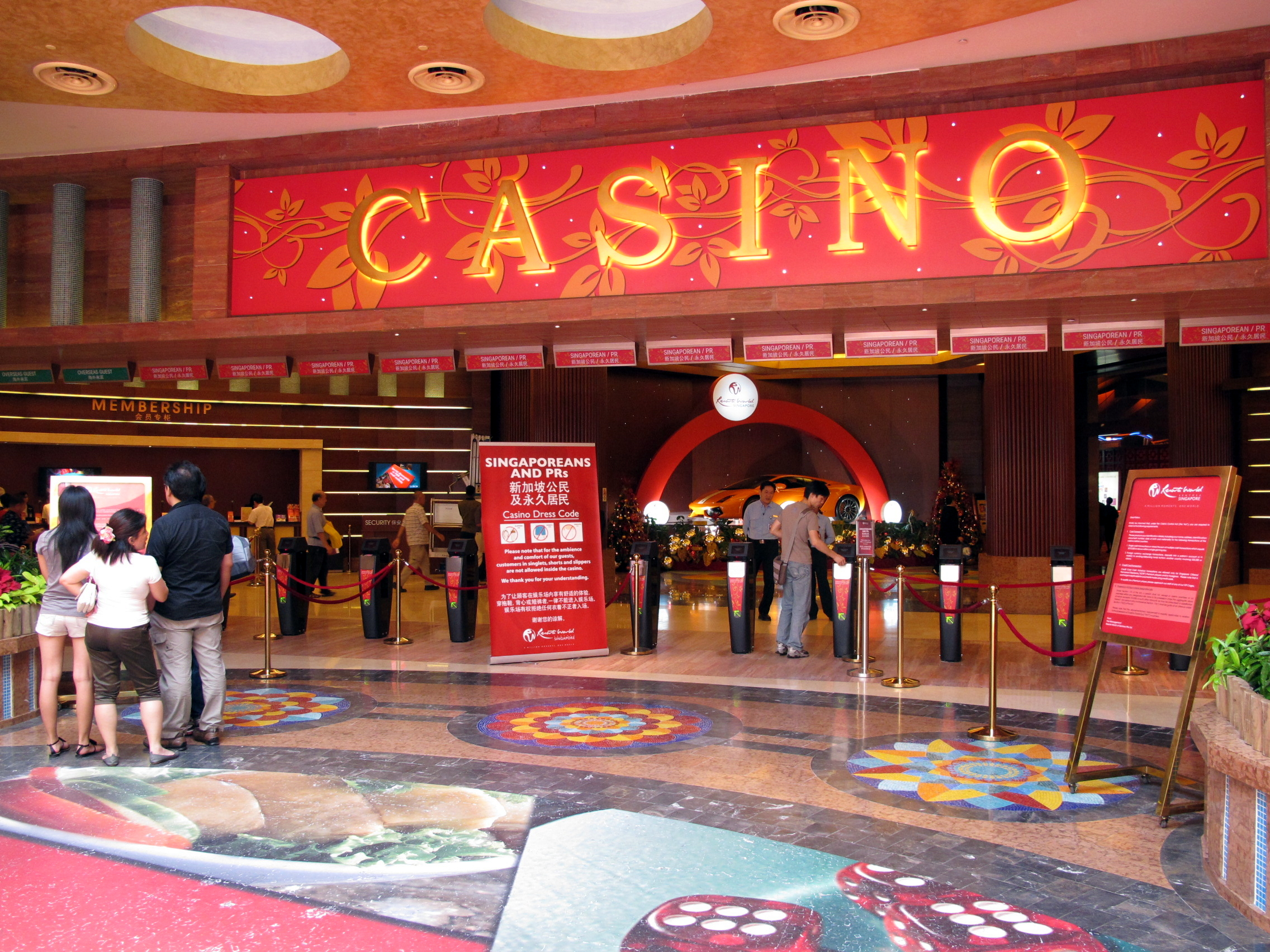 Resorts World Sentosa Casino Enterance